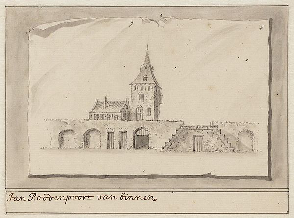 Tekening van de Jan Rodenpoortstoren te Amsterdam